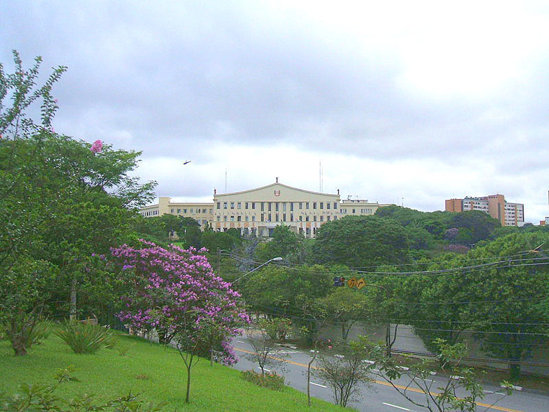 Palácio dos Bandeirantes, visto à distância (bairro do Morumbi, São Paulo, Brasil).